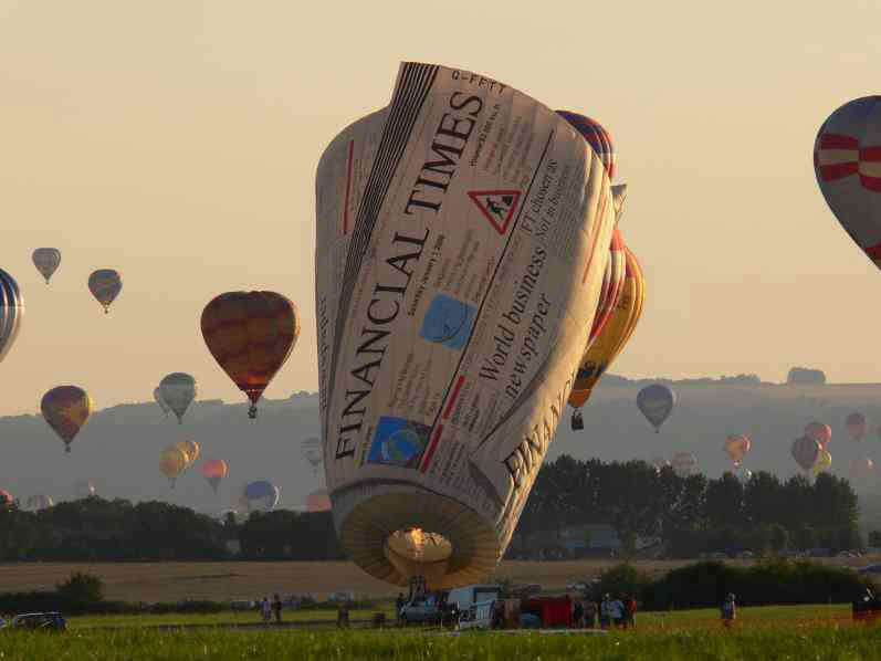 Heißluftballon in Chambley Lothringen